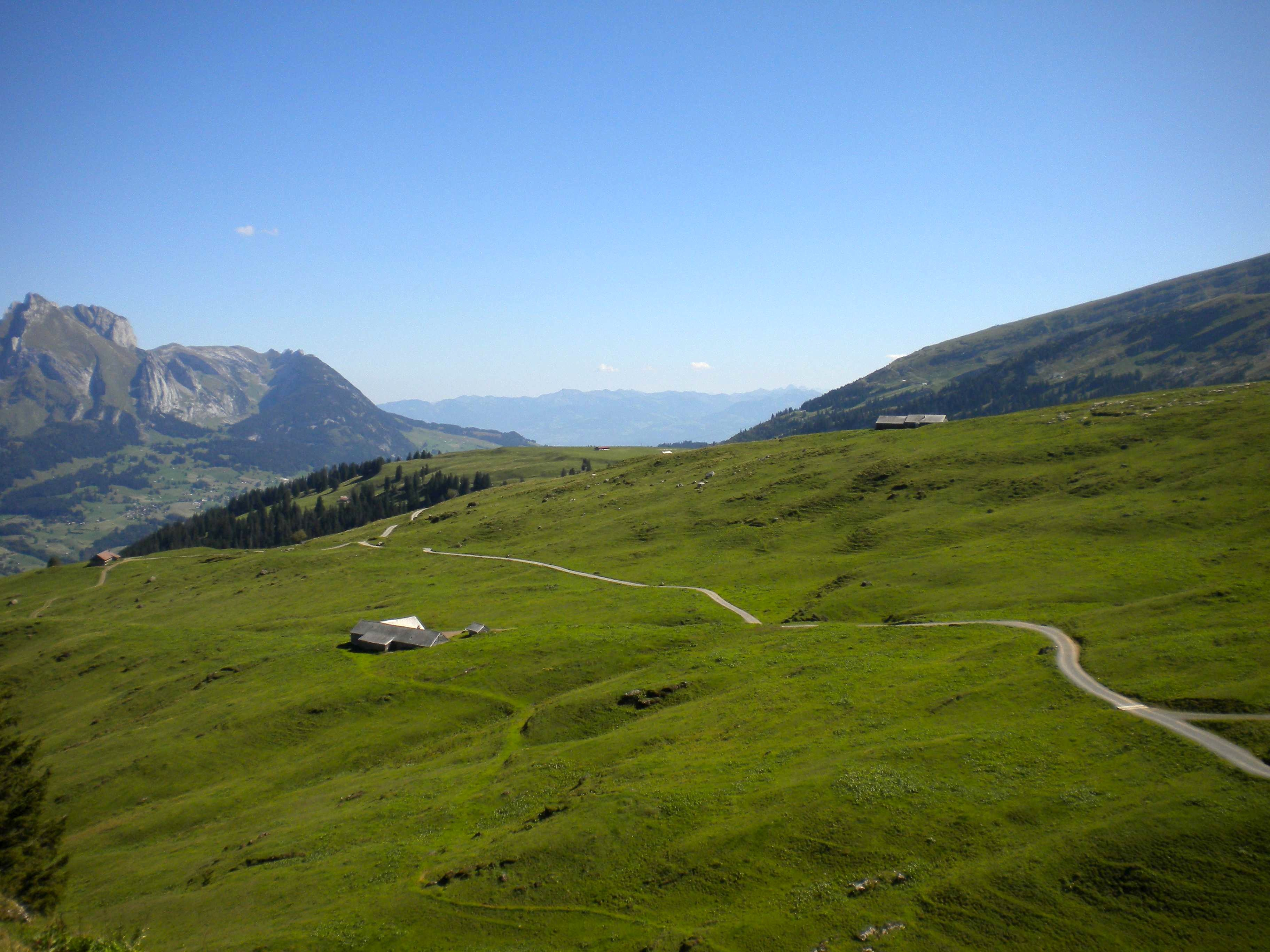 [:de:Toggenburger Höhenweg beim Wildenmannlisloch; Blick nach Osten